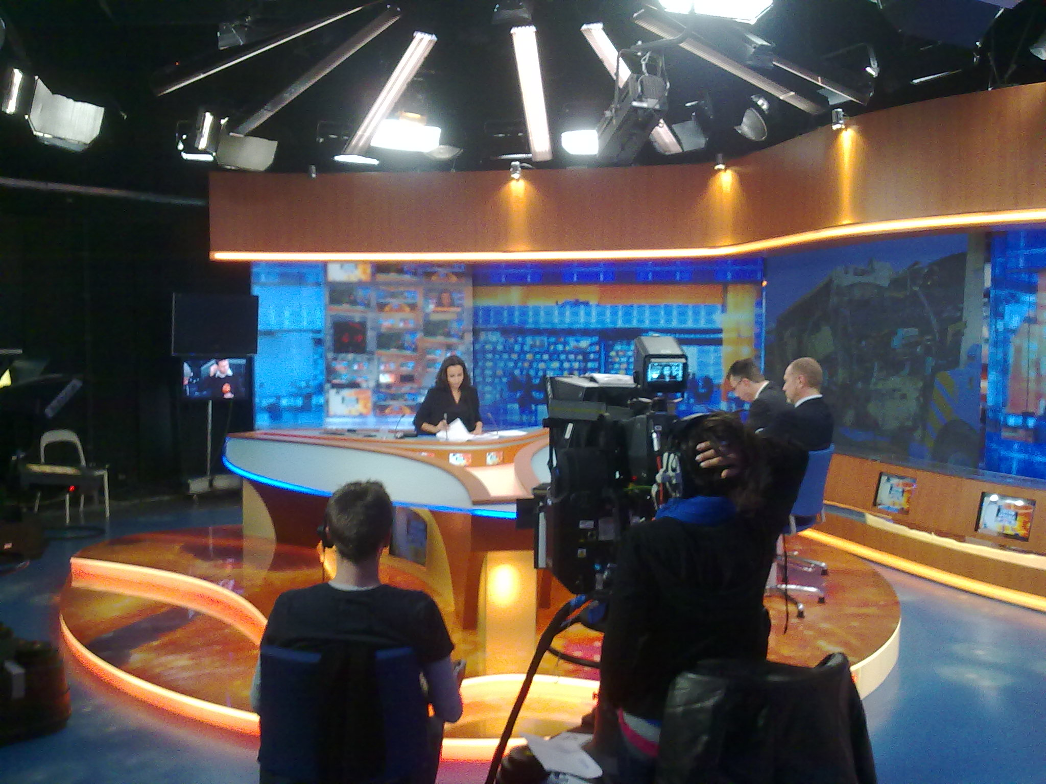 Le studio du Journal télévisé de RYL TVI (Bruxelles) avec Hakima Darhmouch au poste principal. mars 2012